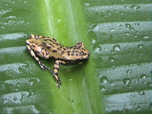 Scinax x-signatus